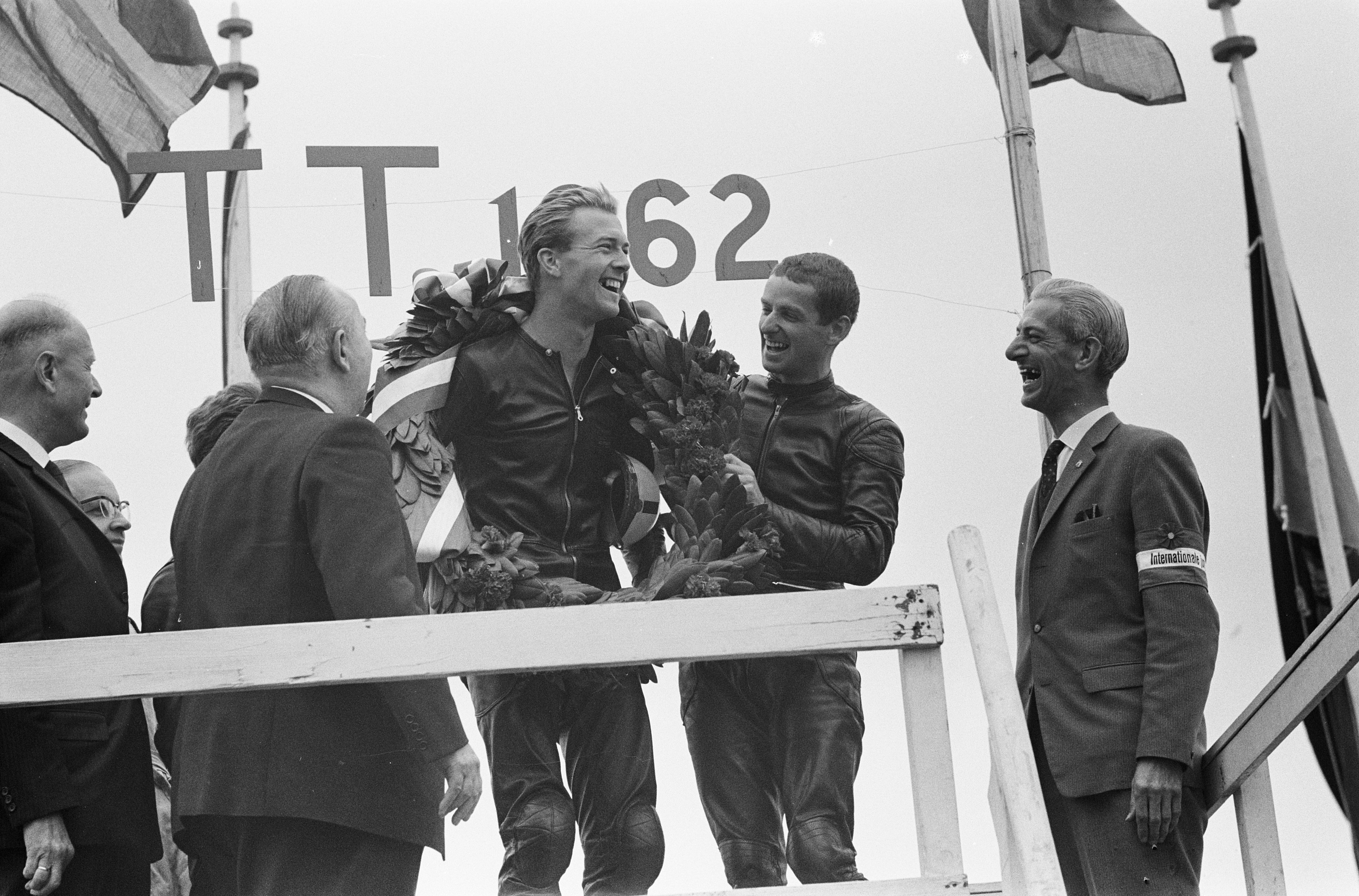 Collectie / Archief : Fotocollectie Anefo Reportage / Serie : TT Assen 1962 Beschrijving : 50cc. Huldiging Ernst Degner (1e) en Jan Huberts (2e) Datum : 1 juli 1962 Locatie : Assen Trefwoorden : motorsport Persoonsnaam : Degner, Ernst, Huberts, Jan Instellingsnaam : TT Fotograaf : Bilsen, Joop van / Anefo Auteursrechthebbende : Nationaal Archief Materiaalsoort : Negatief (zwart/wit) Nummer archiefinventaris : bekijk toegang 2.24.01.05 Bestanddeelnummer : 914-0816